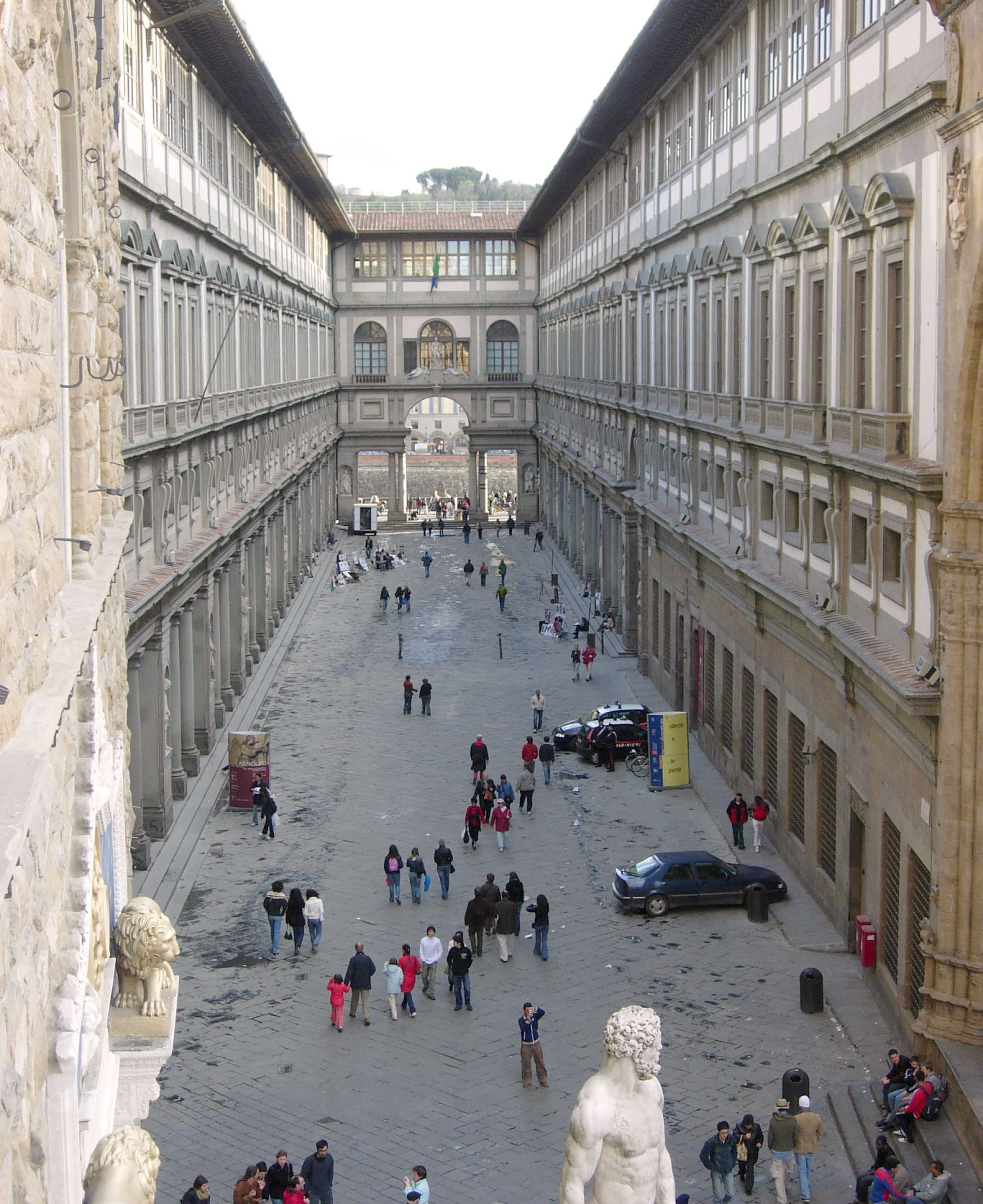 Sujet:D'Galleria degli Uffizi vum viischte Balkon vum Palazzo Vecchio aus gesinn. Source:Commons-User Samulili